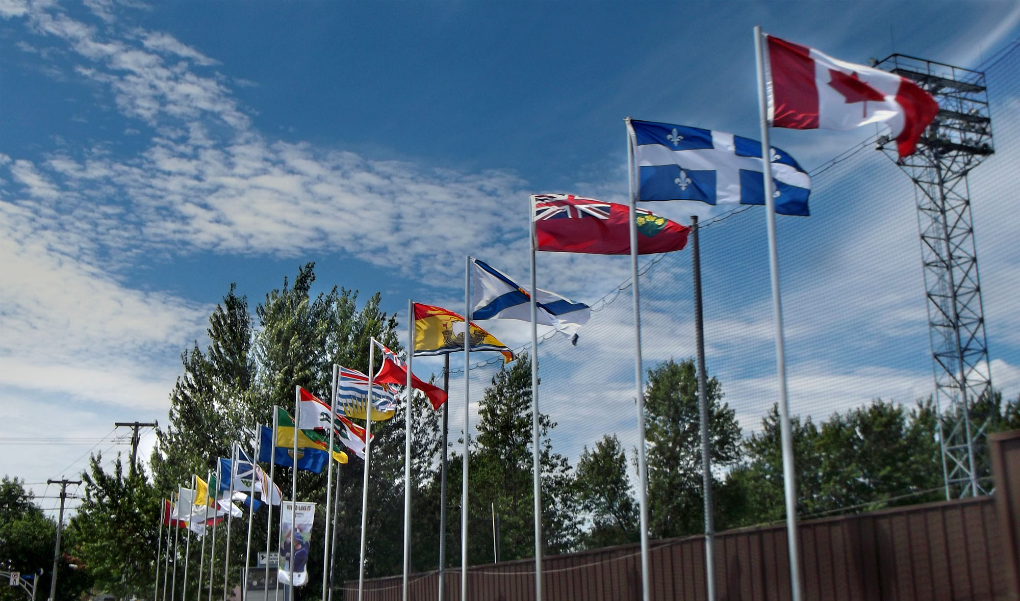 Drapeaux des jeux du Canada a Sherbrooke